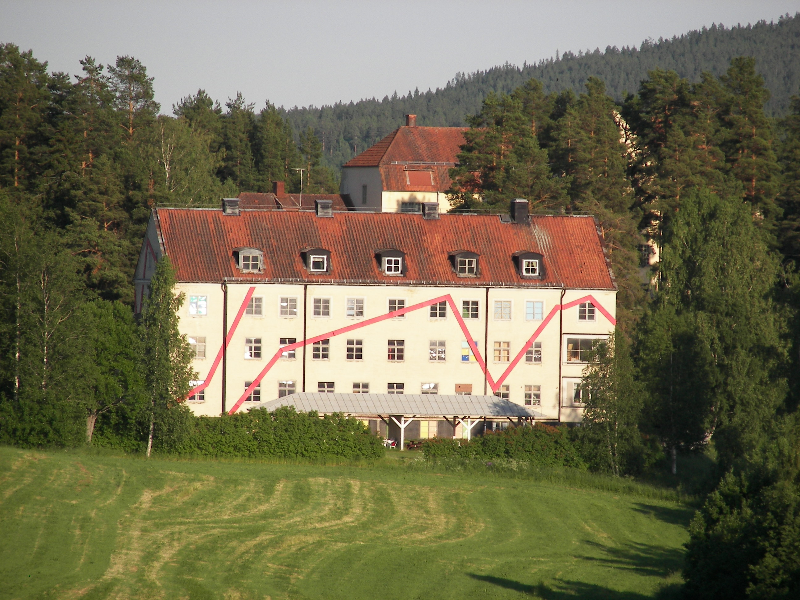 Boda Borg i byn Boda, Ånge kommun, sett från väster från Ljungandalsvägen.